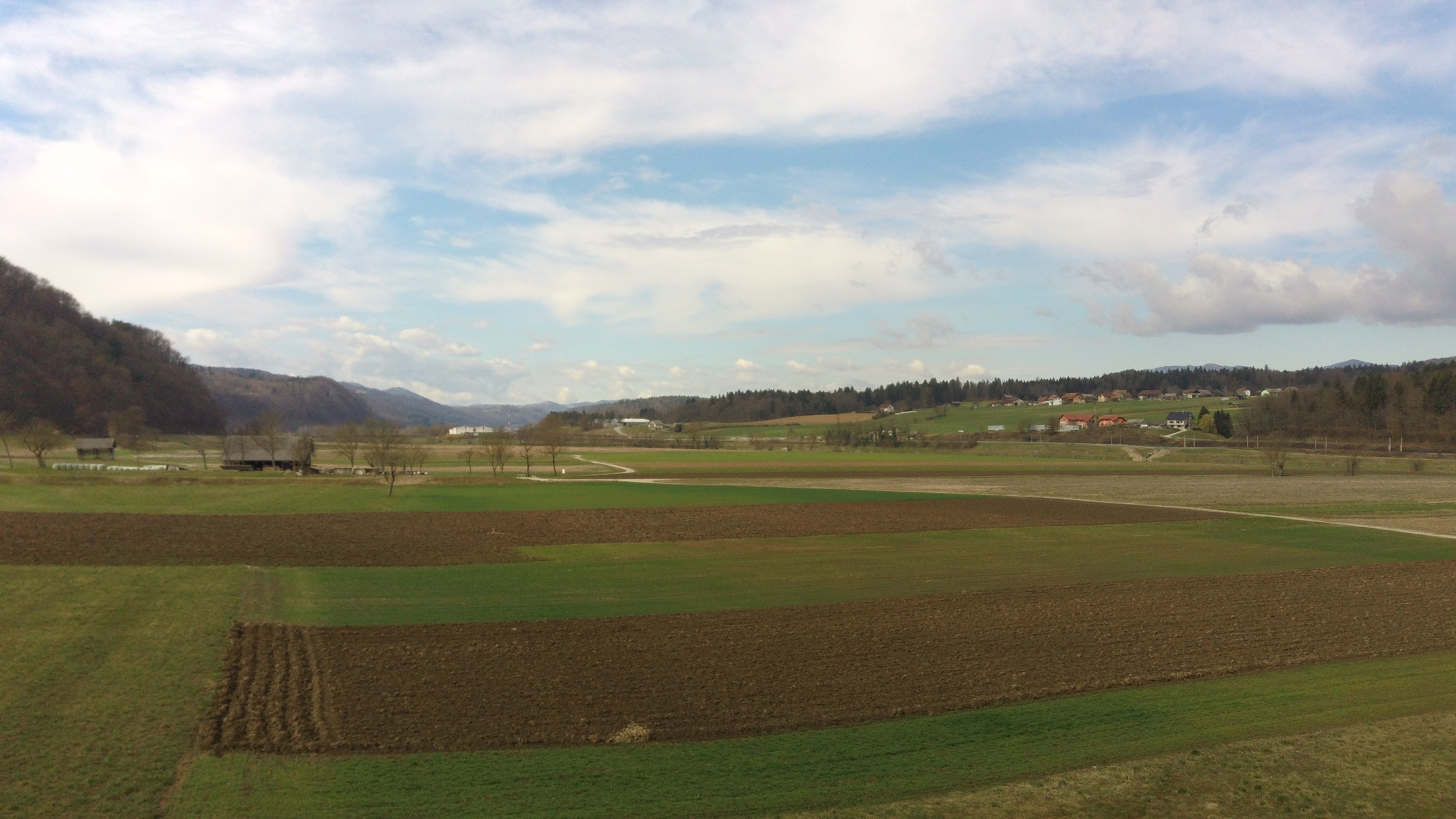 Pogled na Pijavško polje